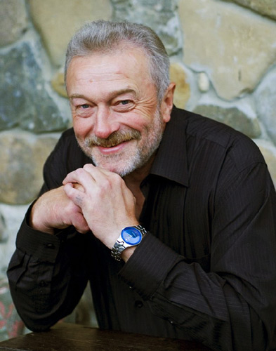 OREST MANIUK